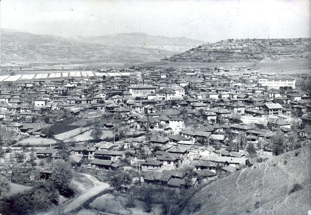 Панорама 1984г.